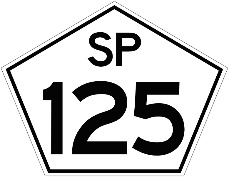 Escudo com a numeração da Rodovia Oswaldo Cruz